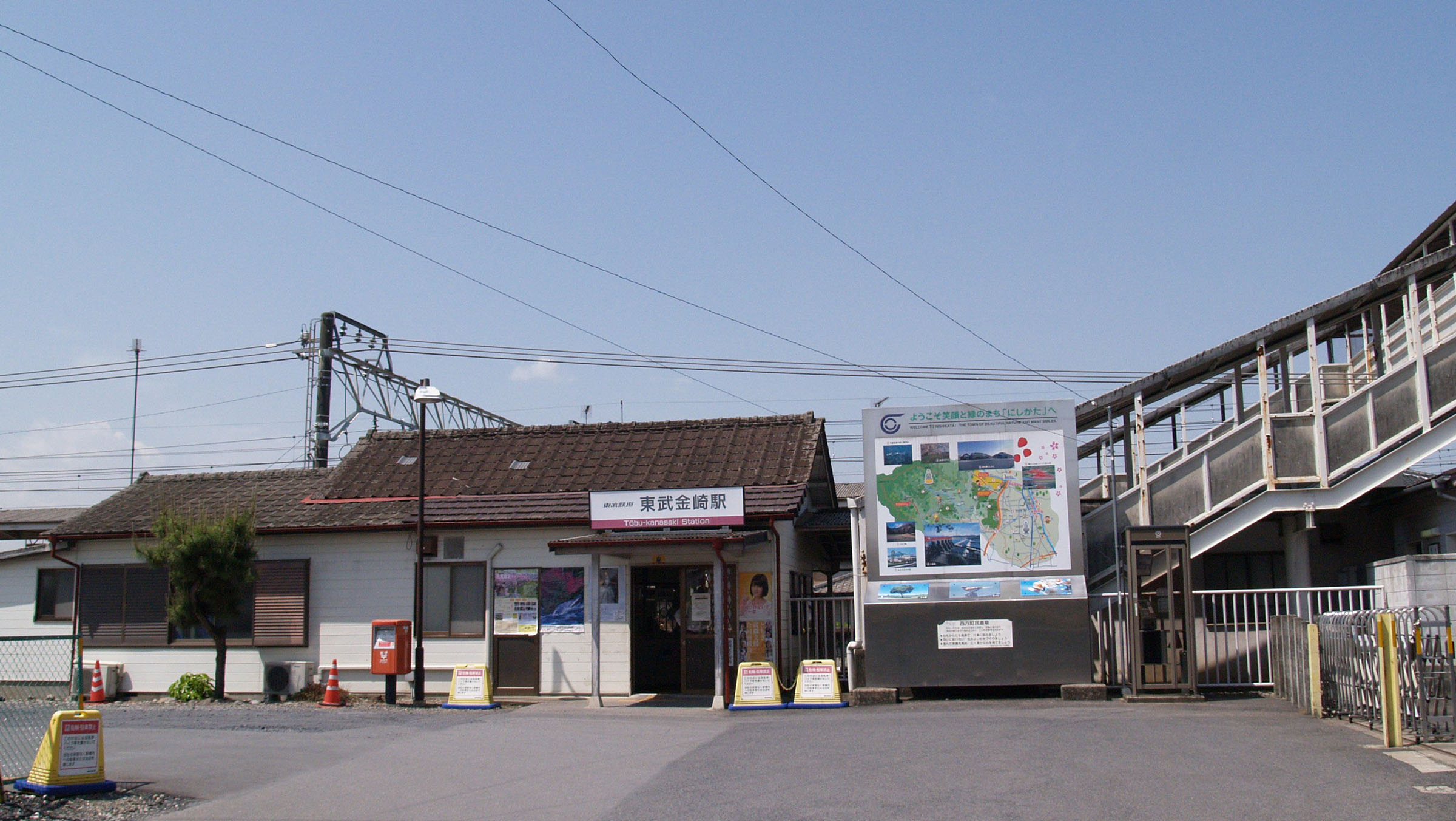 東武金崎駅駅舎